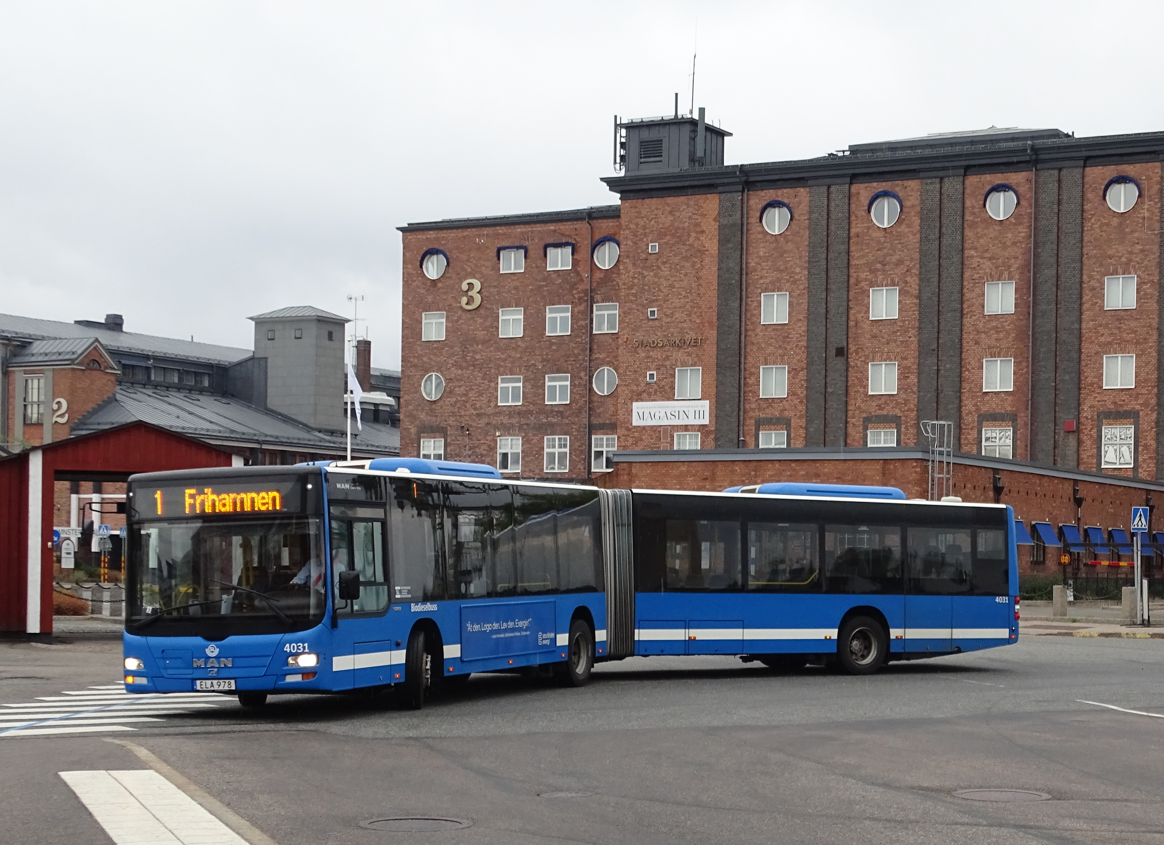 Storstockholms Lokaltrafik bus 4031 op lijn 1 aan de eind-/beginhalte in Frihamnen, Stockholm, Zweden.